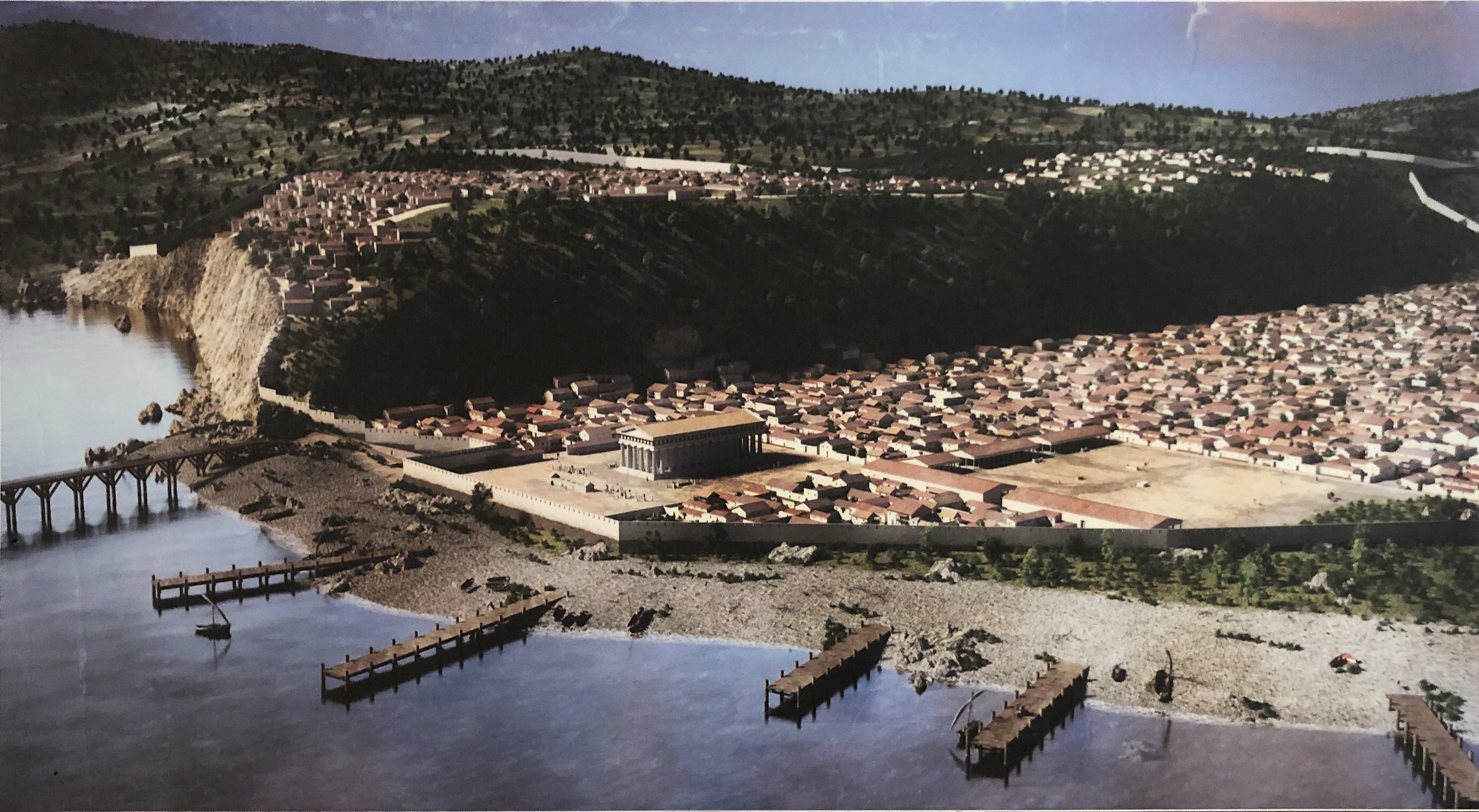 Ricostruzione di Himera